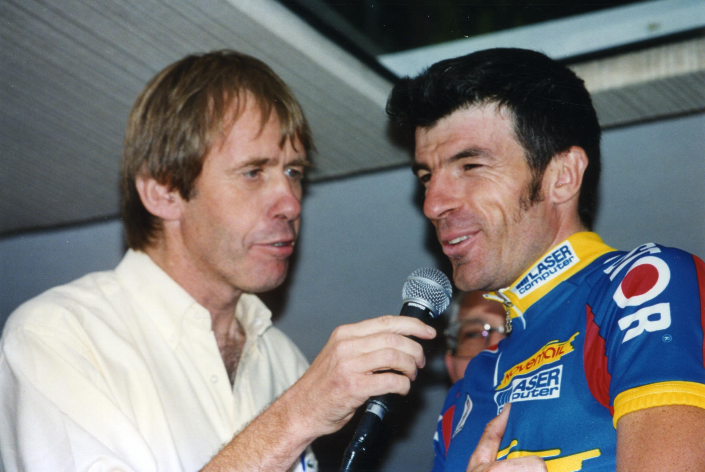 Critèrium de LEVES